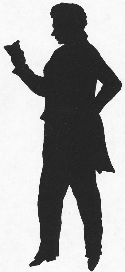 A silhouette of Isaac Harby, made by anonymous in 1810.